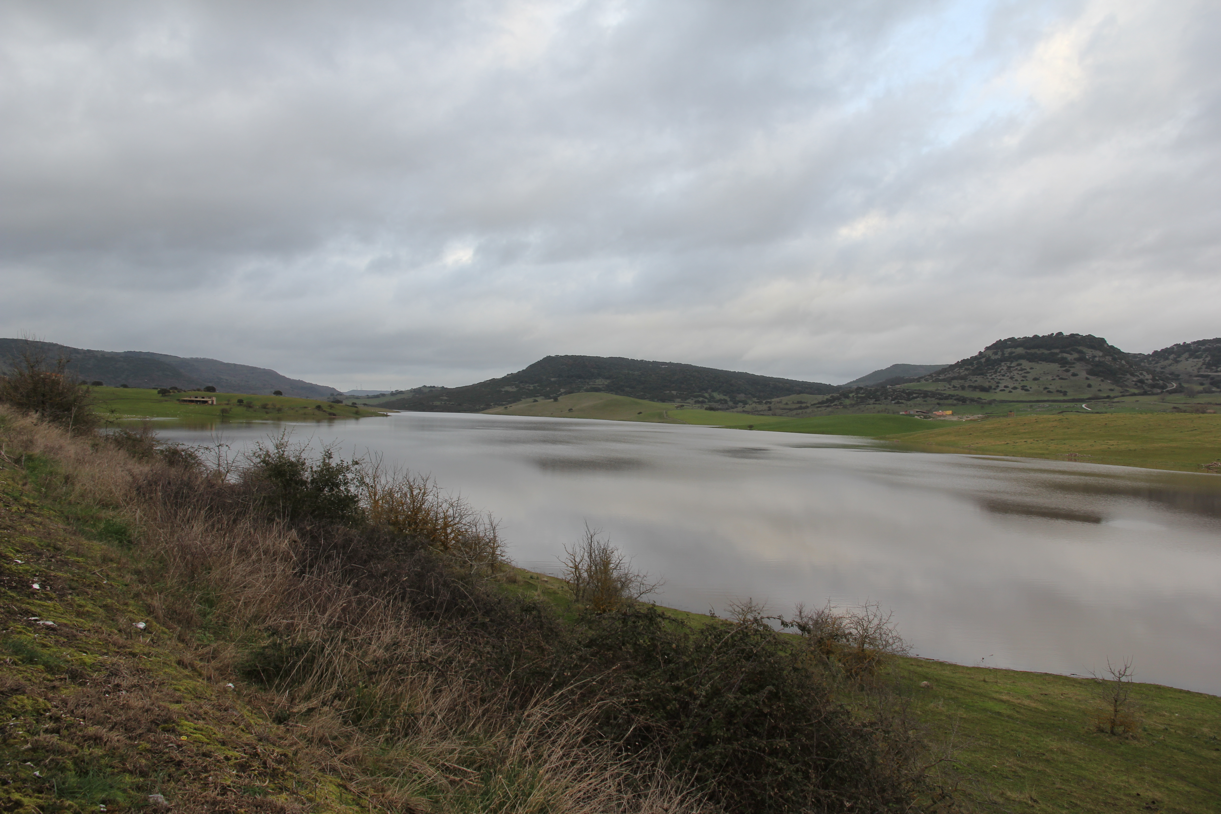 Bessude - Thiesi - Lago Bidighinzu